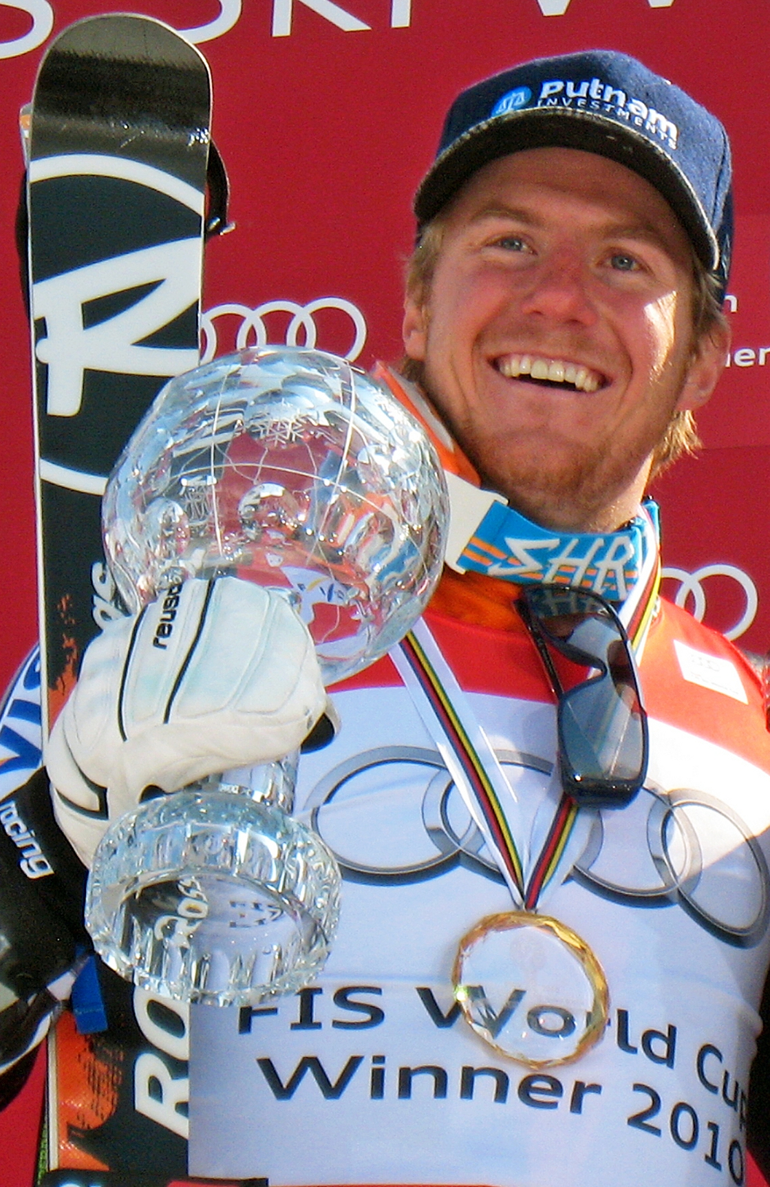 The U.S. alpine skier Ted Ligety